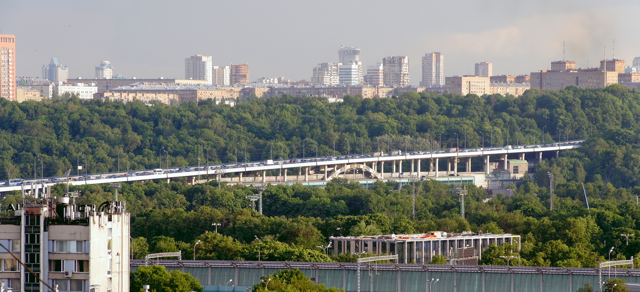 Лужнецкий метромост